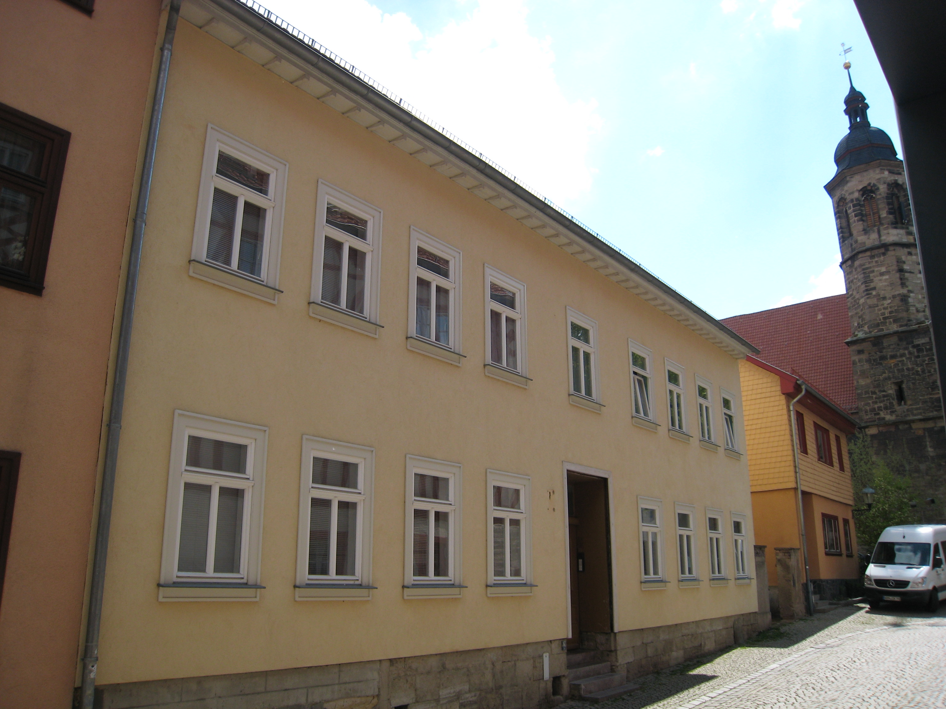 Haus Kirchgasse 6 in Arnstadt, wo auch Heinrich Bach wohnte.